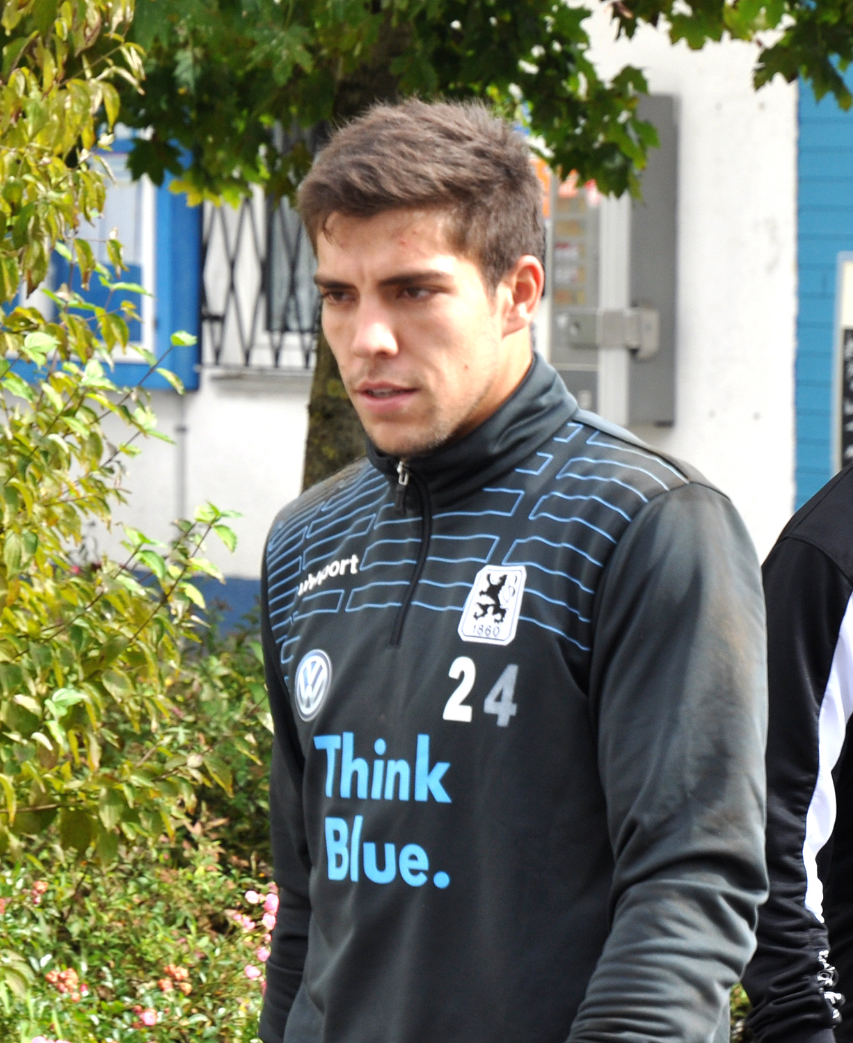 Stefan Ortega